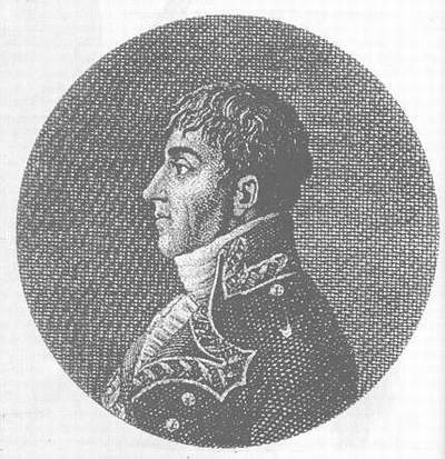 Gregorio García de la Cuesta (1741-1811), general español